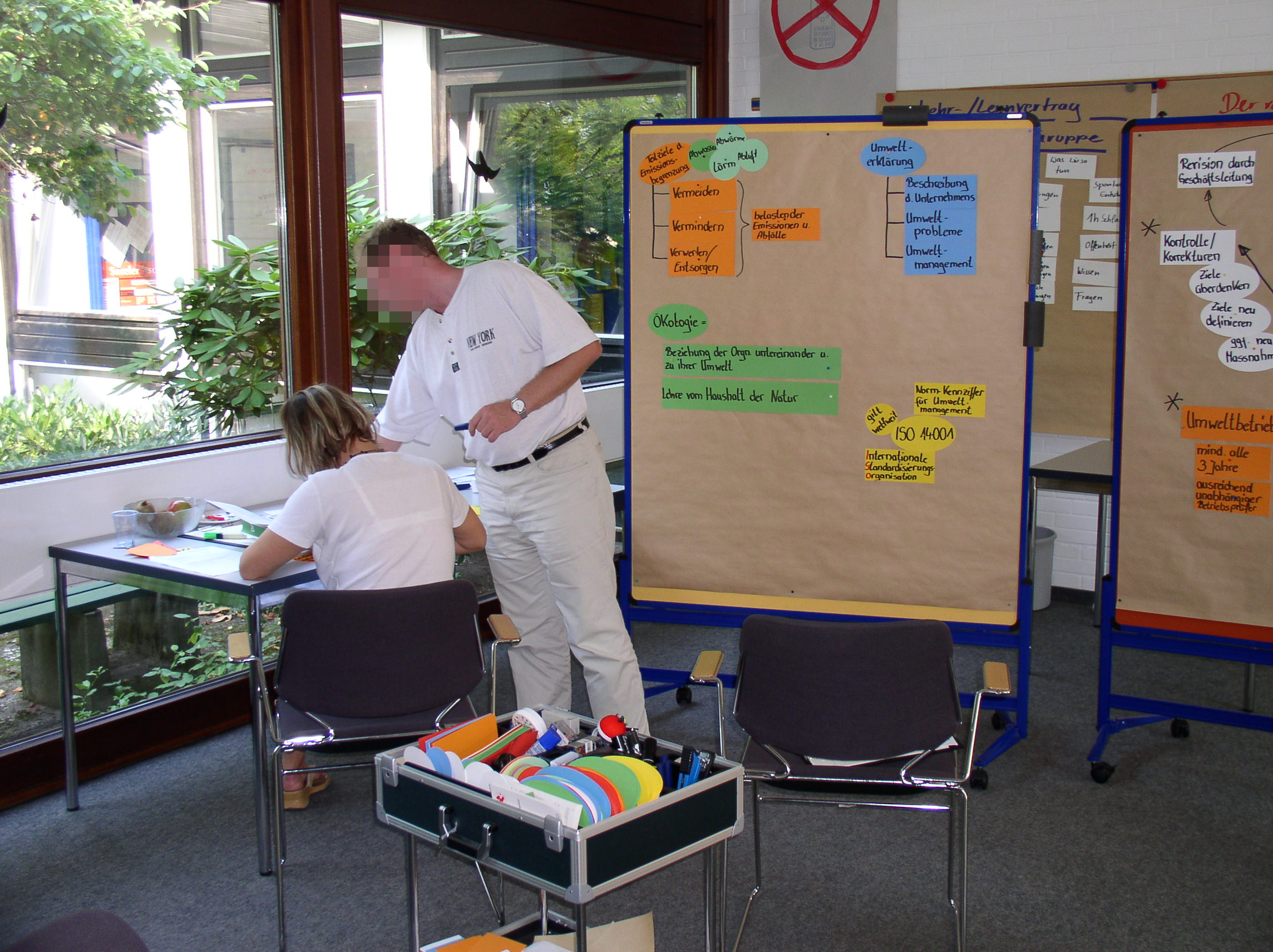 Visualisierung von Arbeitsgruppenergebnissen über Metaplan und Pinnwand